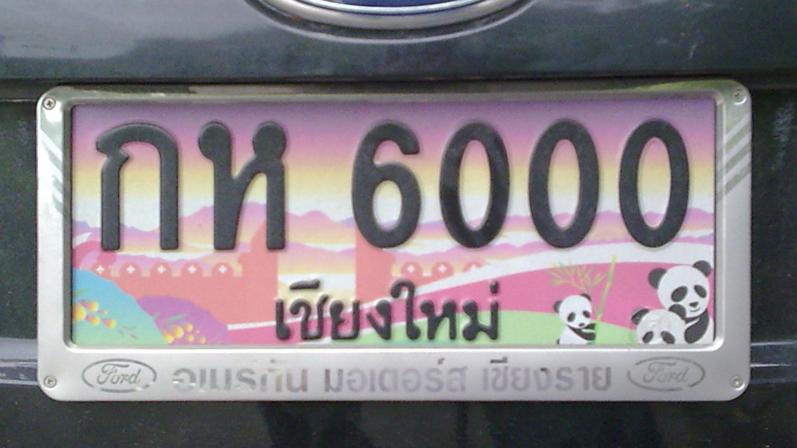 หนึ่งในหลายป้ายทะเบียนเลขสวย ที่สำนักงานขนส่งจังหวัดเชียงใหม่จัดการประมูล (auctioned plate from Chiangmai, Thailand) (ไม่ใช่ป้ายของข้าพเจ้า - ไม่ทราบเจ้าของ - This is not my plates.)